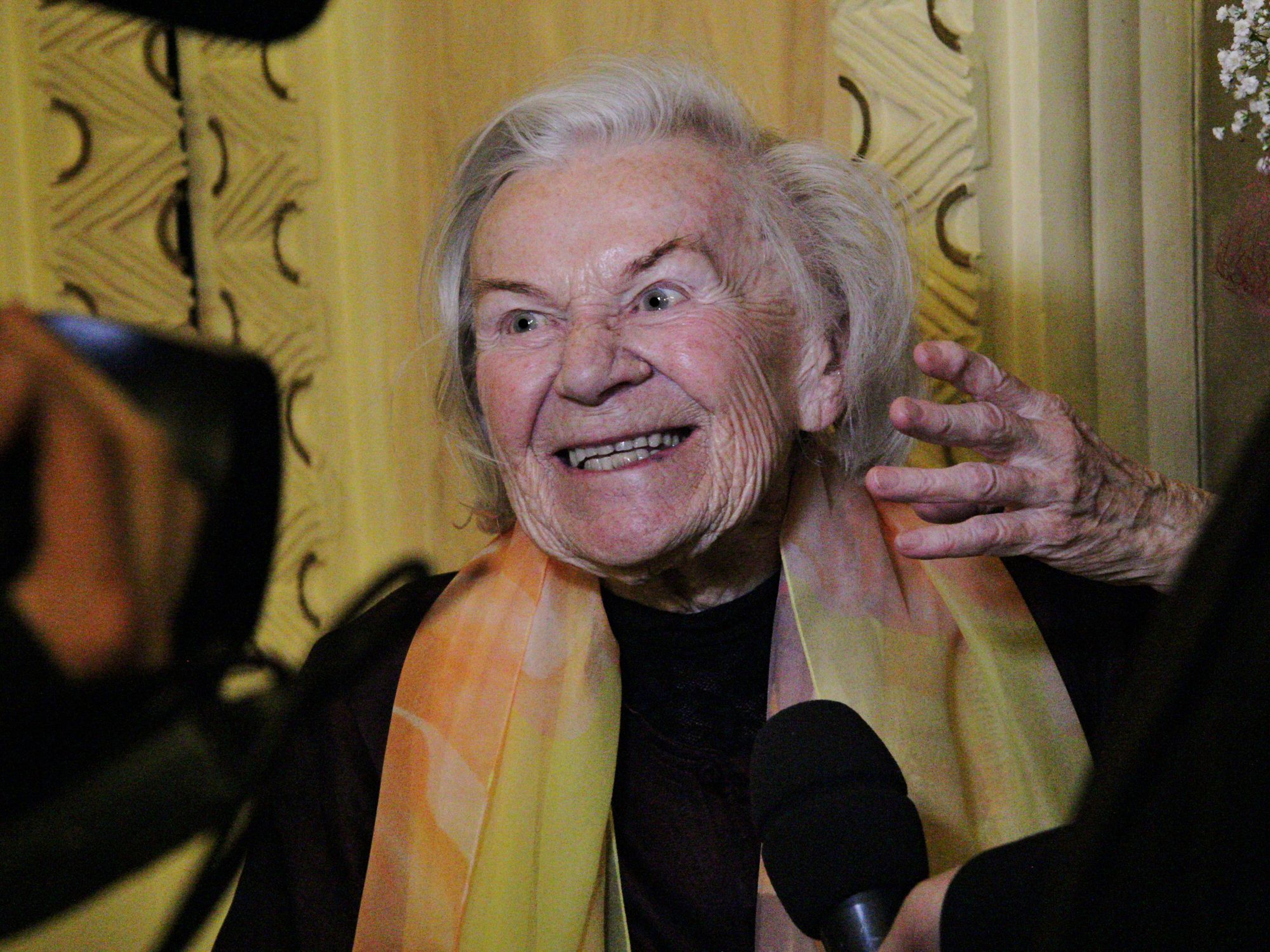 Hana Truncová